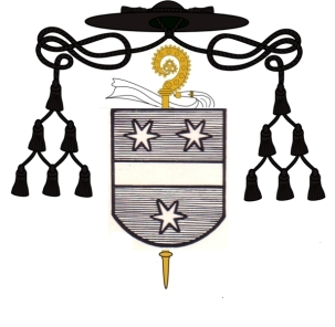 Wappen Judas Thaddäus Siegerst, 1735 - 1806, Abt von Münsterschwarzach (1794-1803)